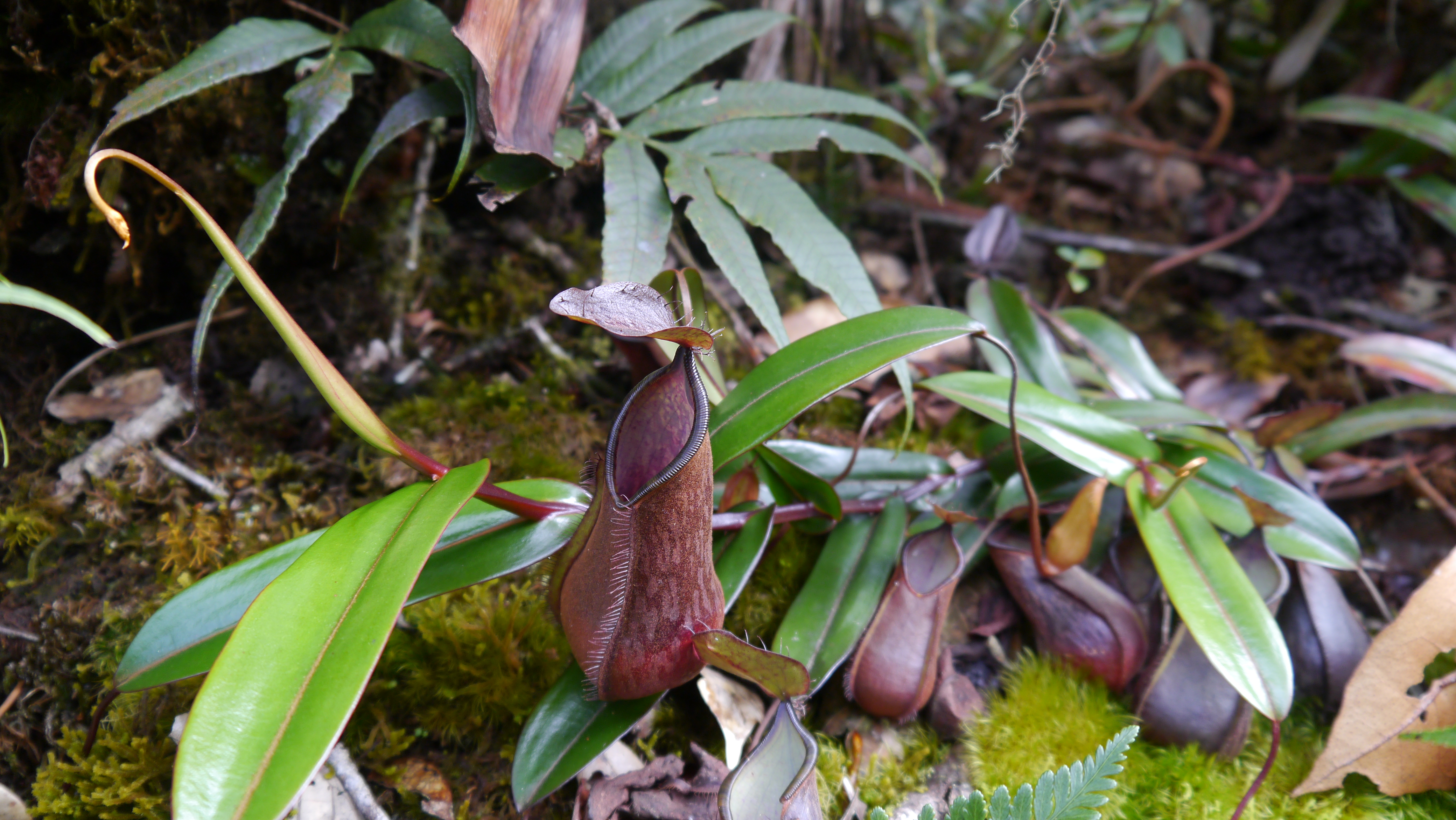 Népenthes du Mont Kinabalu, Sabah, Eastern Malaysia